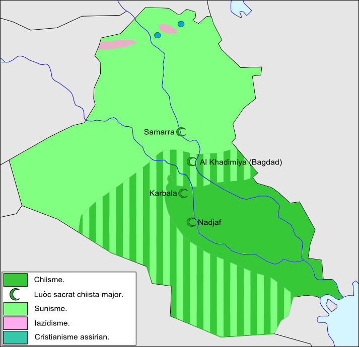 Religions d'Iraq